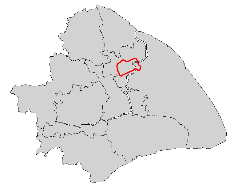 上海轨道交通4号线简图 本地图的底图不表示上海市全部所辖区域 因版面关系，上海市所辖之崇明岛、长兴岛等与本线路无关的离岛未在本图中表示。